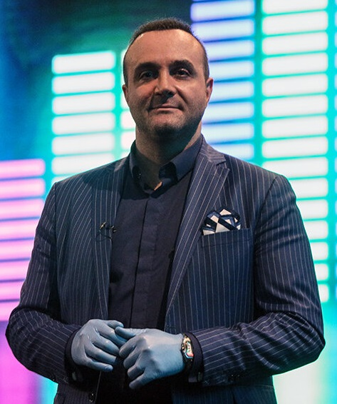 سینا سرلک